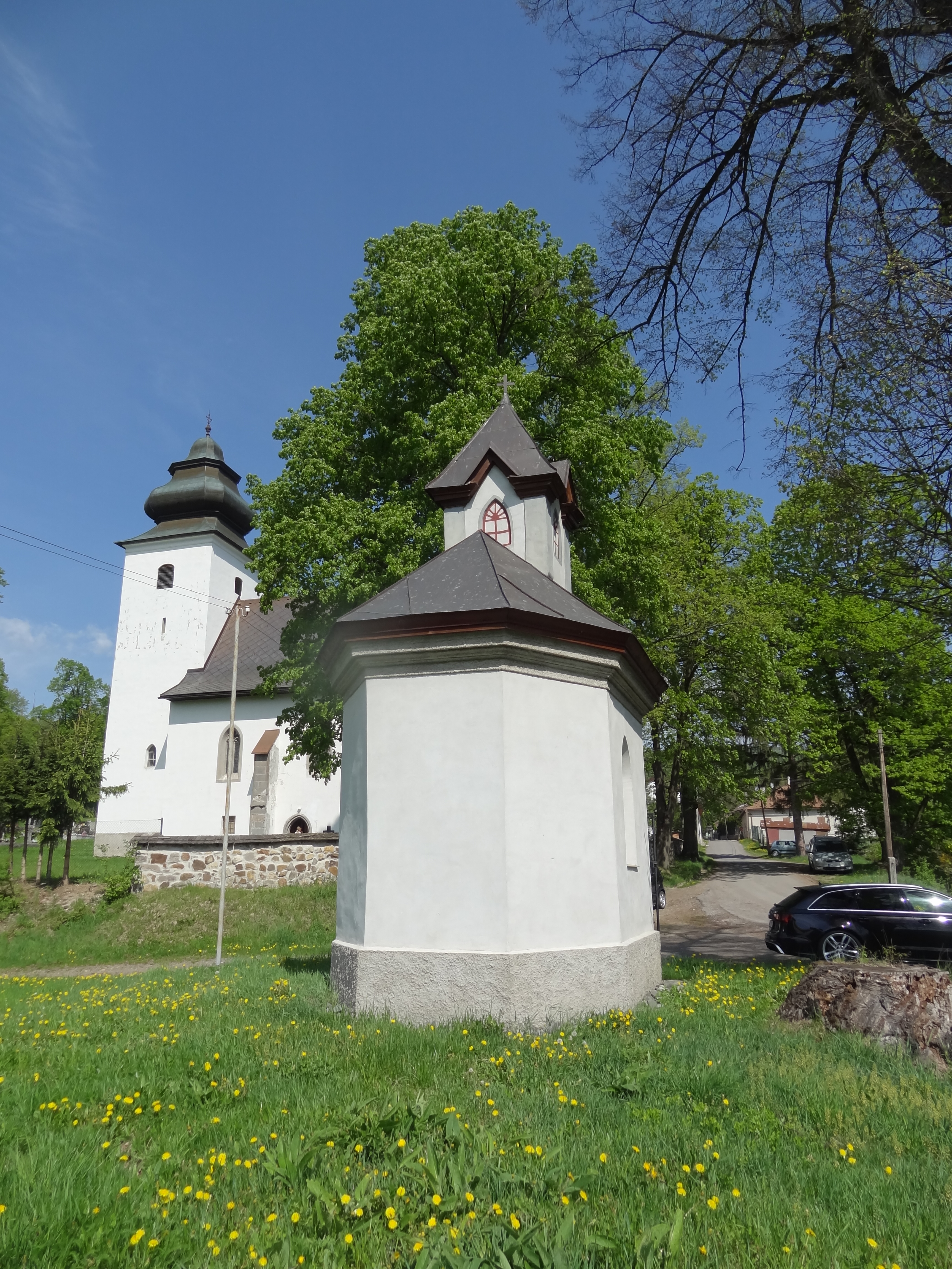 pohľad na kostol a kaplnku Panny Márie